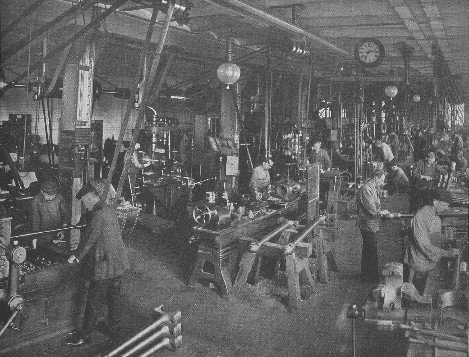 „Drehereisaal im alten Werk Buckau“ (Originalbeschreibung)